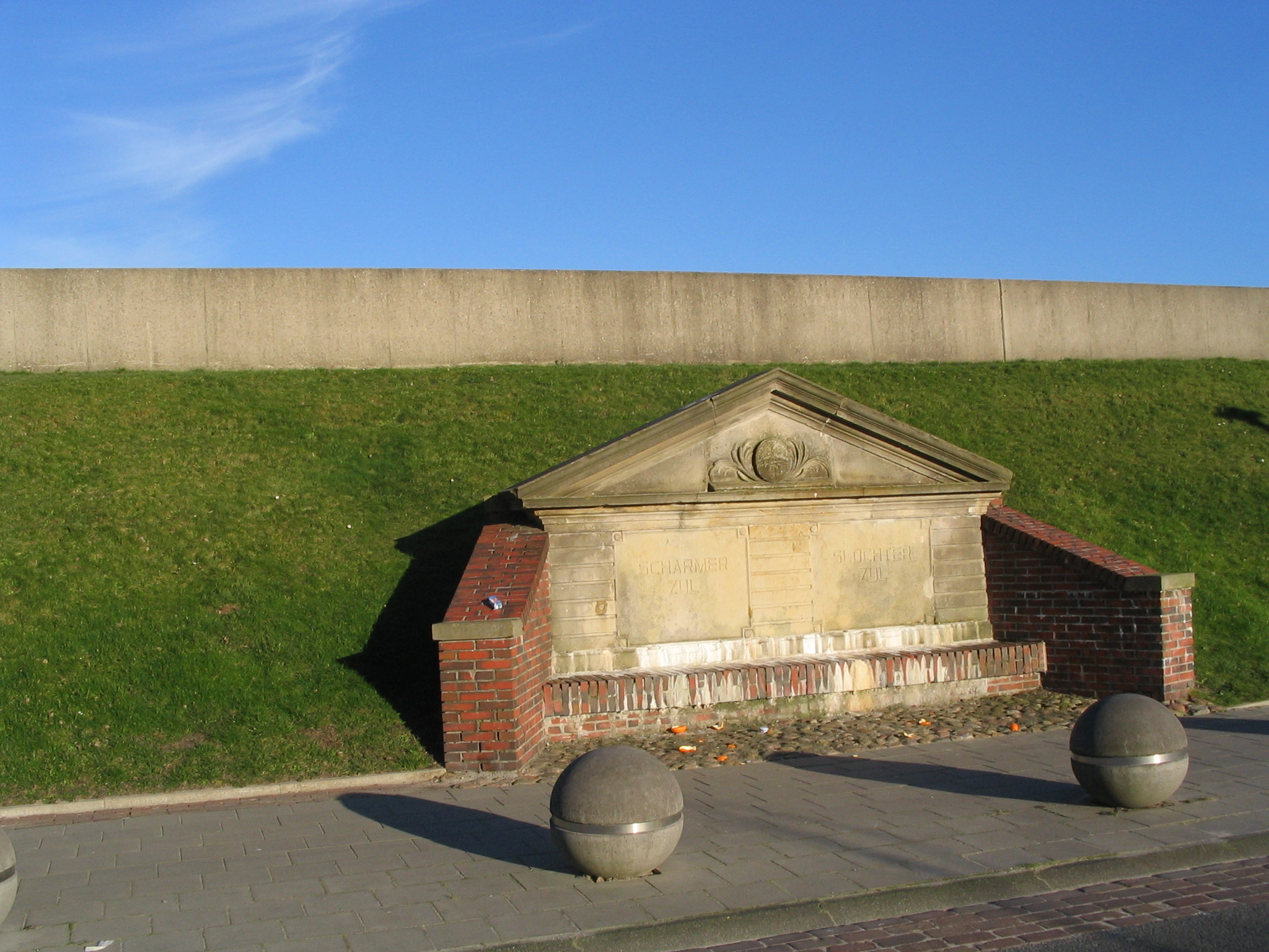 Gedenksteen voor de Scharmer- en Slochterzijl in Delfzijl